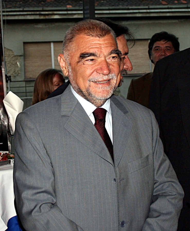 Stjepan Mesić na premijeri filma "Nije kraj" u Zagrebu